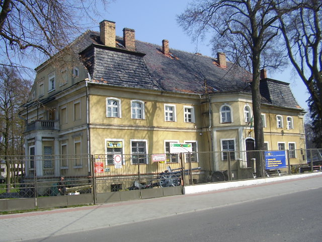 Lubuskie Muzeum Wojskowe w Drzonowie